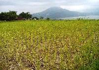 Lumban Suhisuhi Dolok